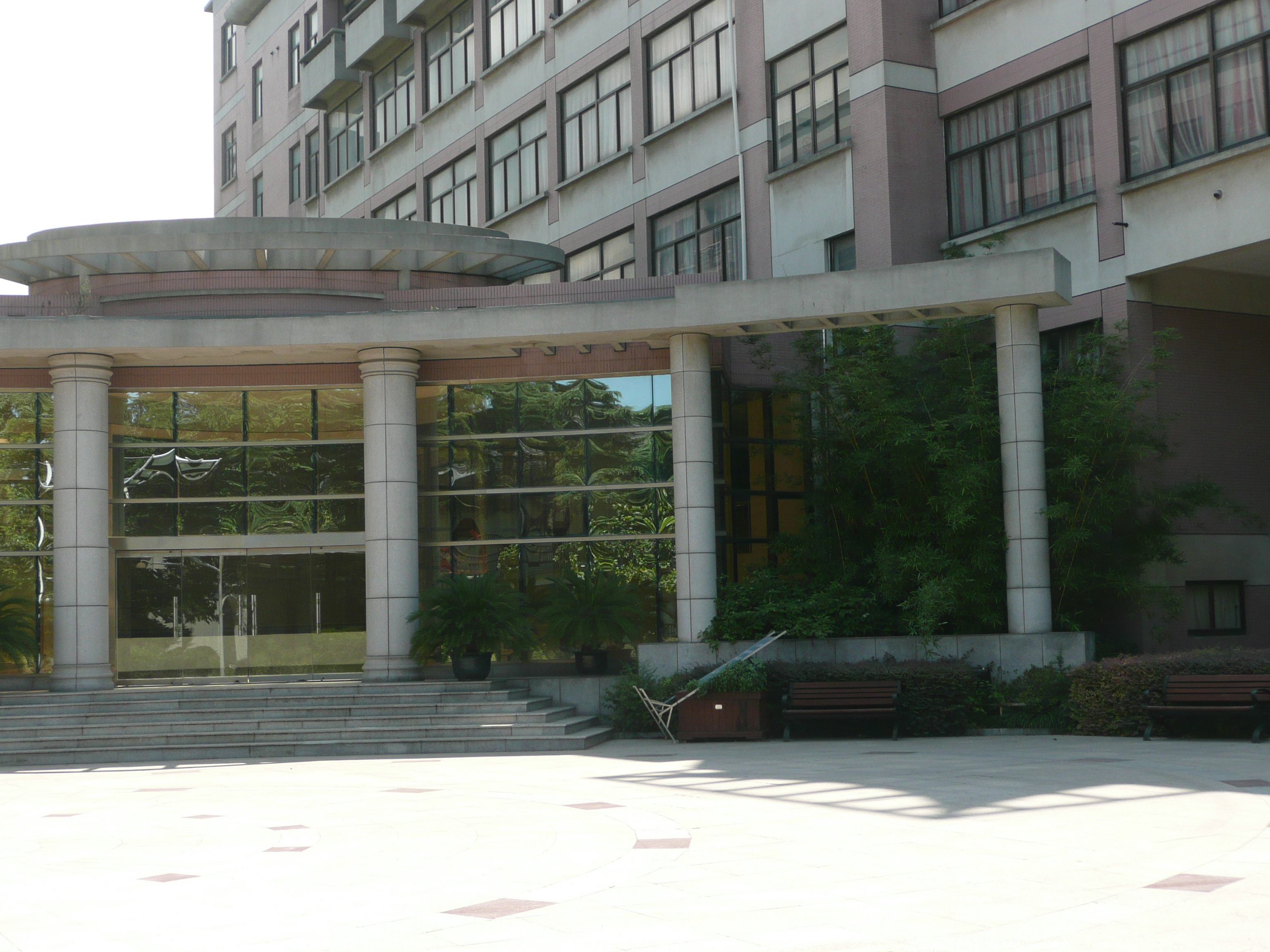 中文（中国大陆）: 江苏省南通中学躬行楼（实验楼）